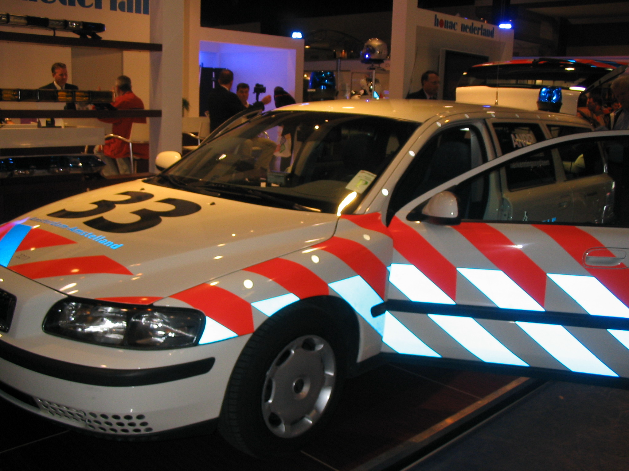 Zelf gemaakte foto